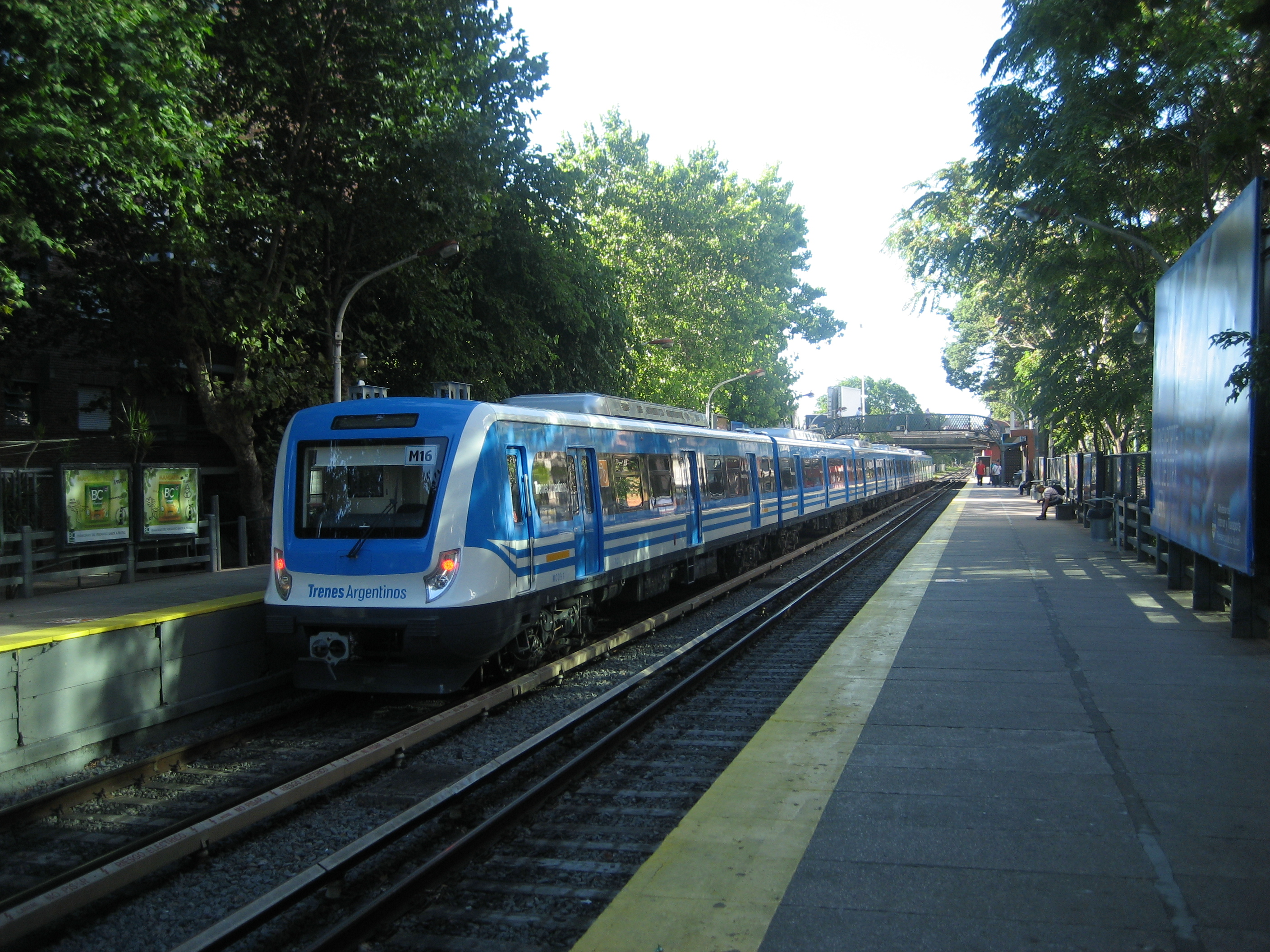 Nuevo tren en Estación Rivadavia (Línea Mitre)